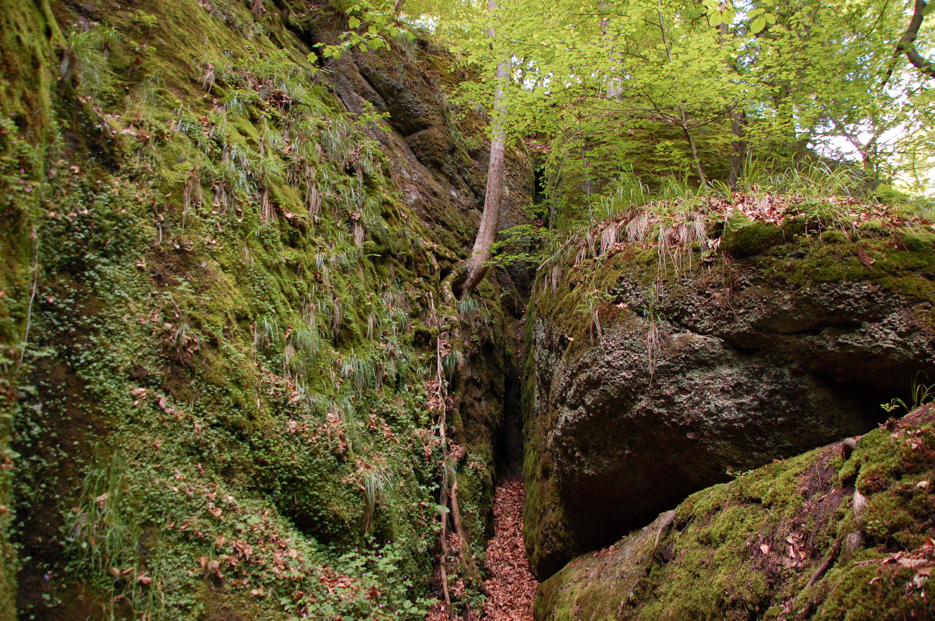 Wände vor der Drachenschlucht; NSG Wartburg–Hohe Sonne